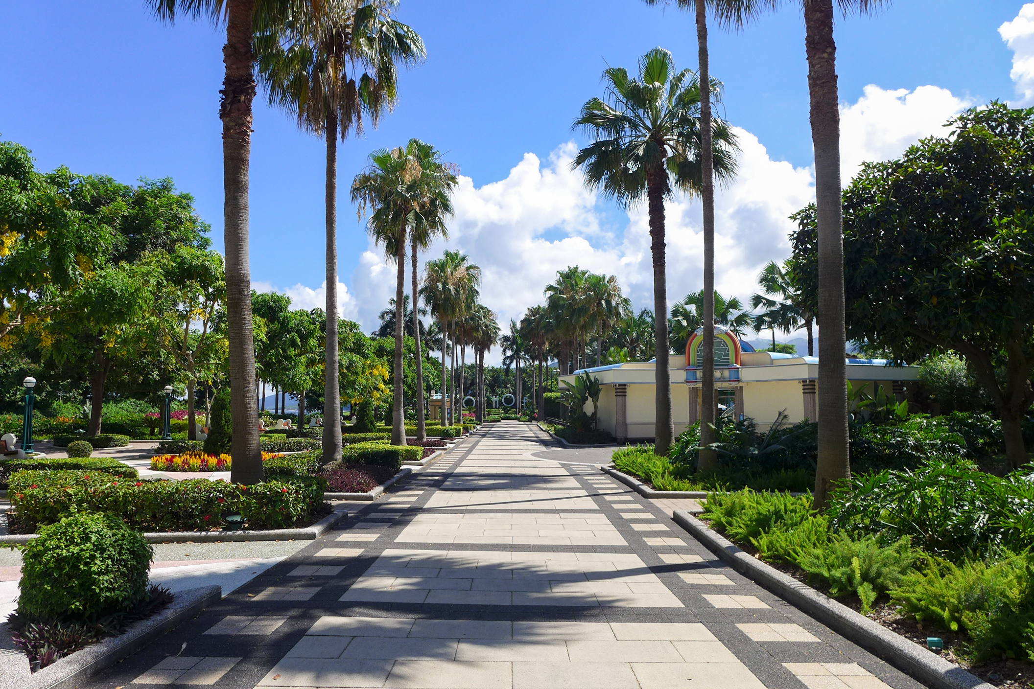 Disneyland Hollywood Hotel